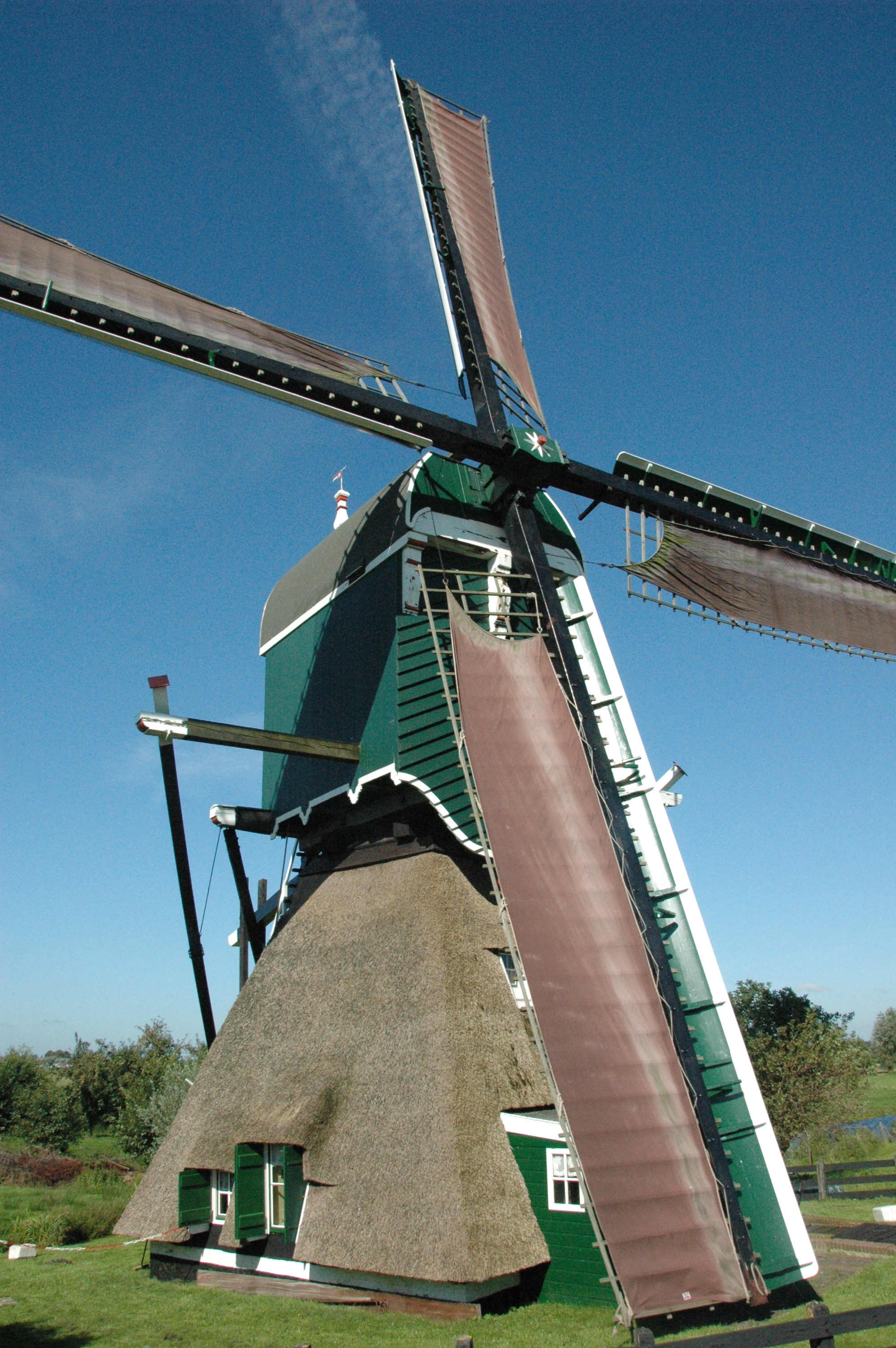 Oukoopsemolen, Reeuwijk